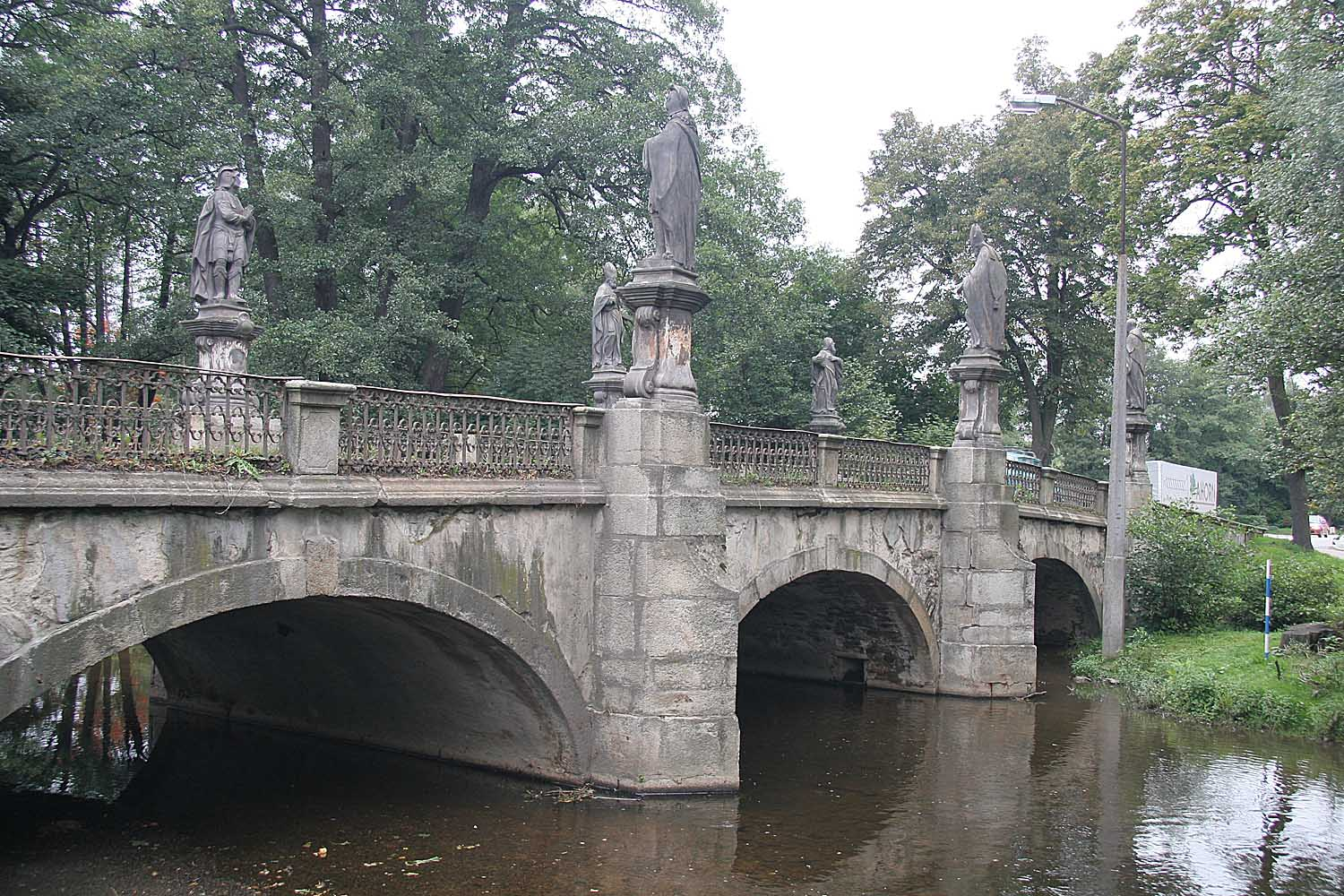 Most s barokními sochami ve Žďáru nad Sázavou, district Žďár nad Sázavou, Czech Republic autor: Prazak Date: 6. 9. 2006